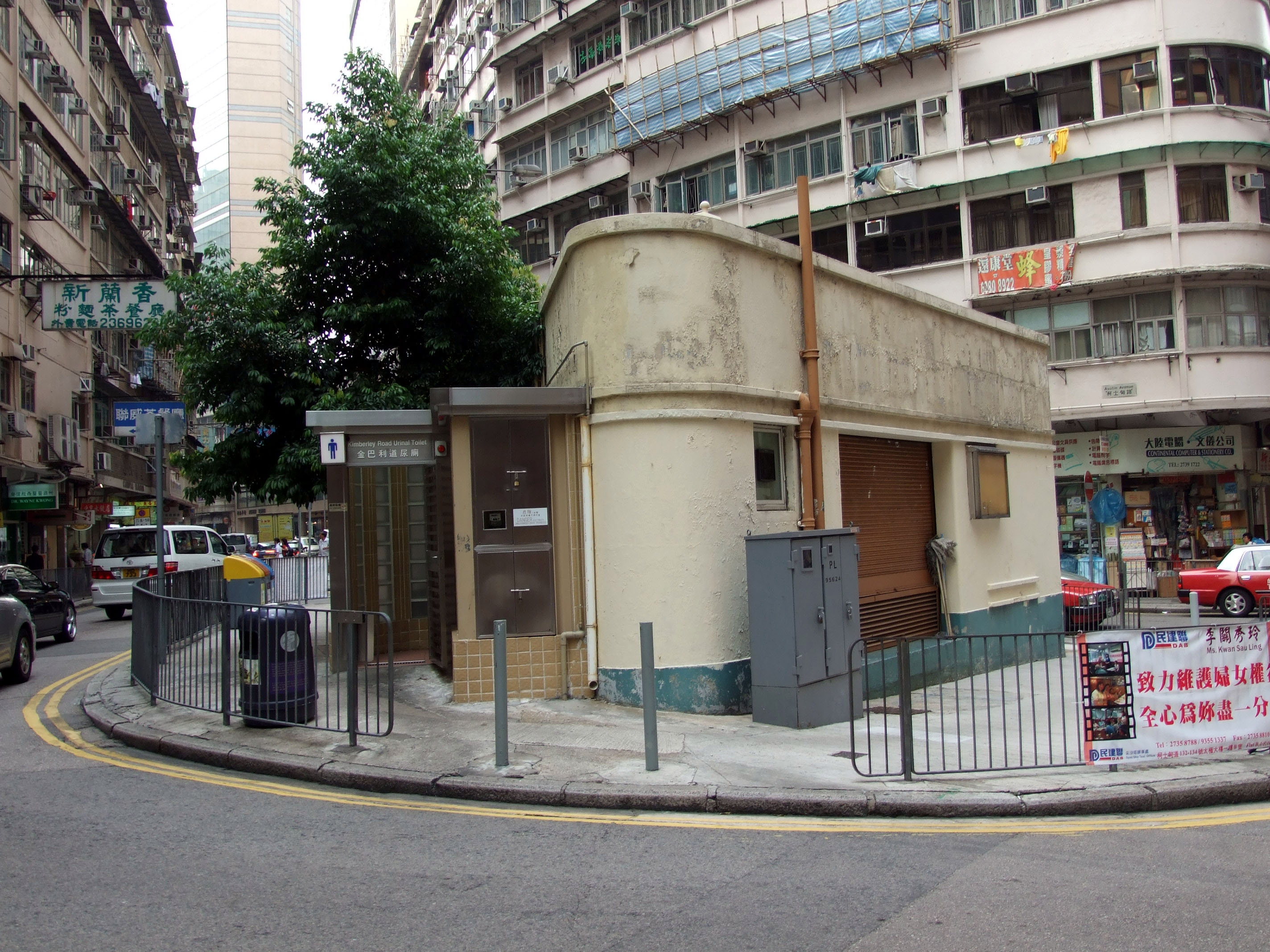 中文（香港）: 金巴利道尿廁(1960s)